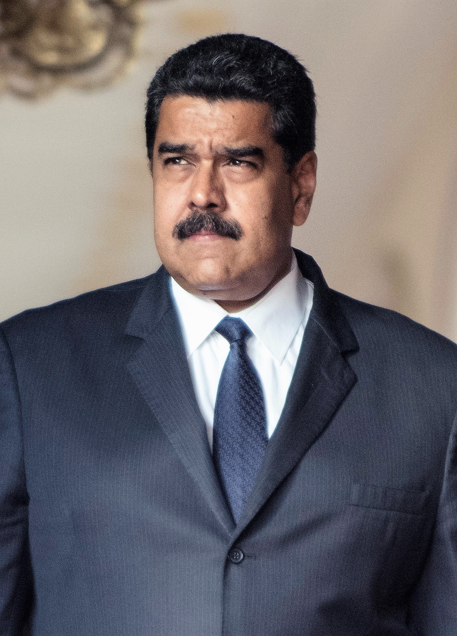 Nicolás Maduro Moros, presidente de la República Bolivariana en Venezuela en 2016.